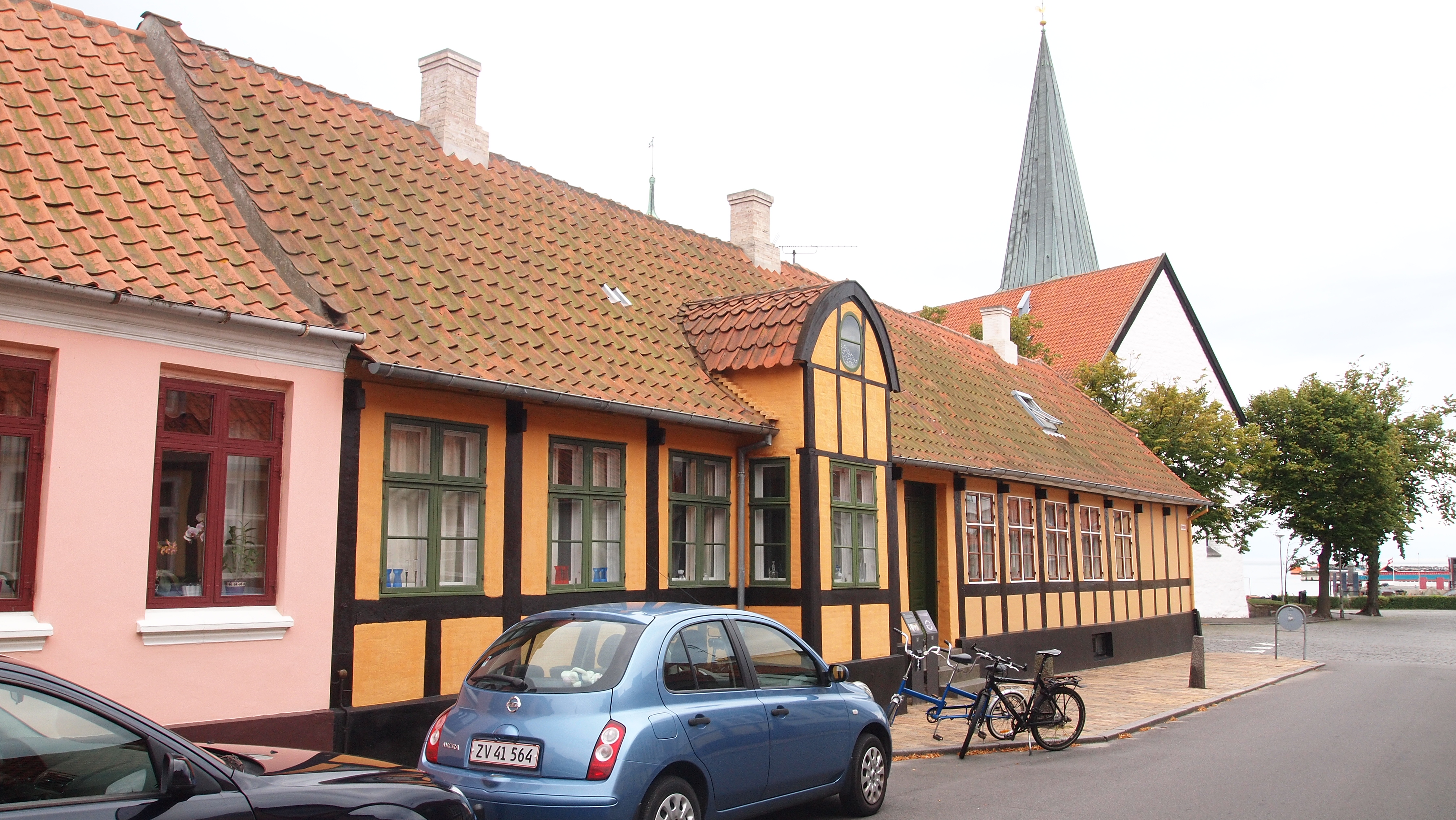 Østergade 2